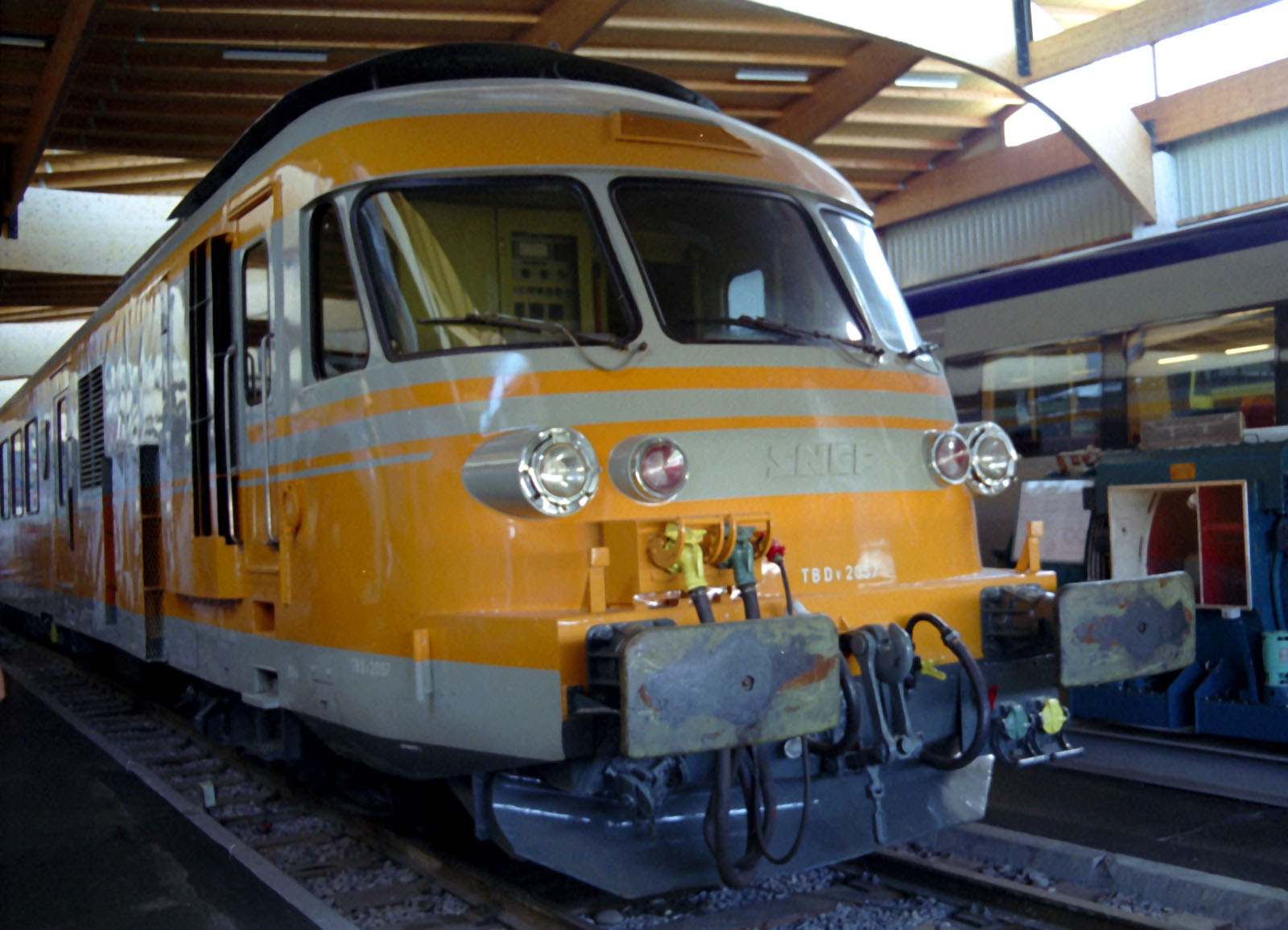 Motrice RTG de la SNCF exposée au musée du chemin de fer de Mulhouse. SNCF RTG train in the railway museum of Mulhouse.